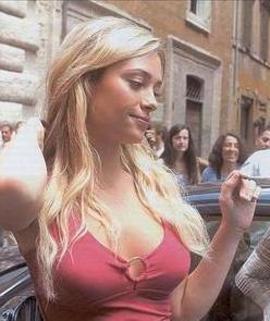 Martina Stella